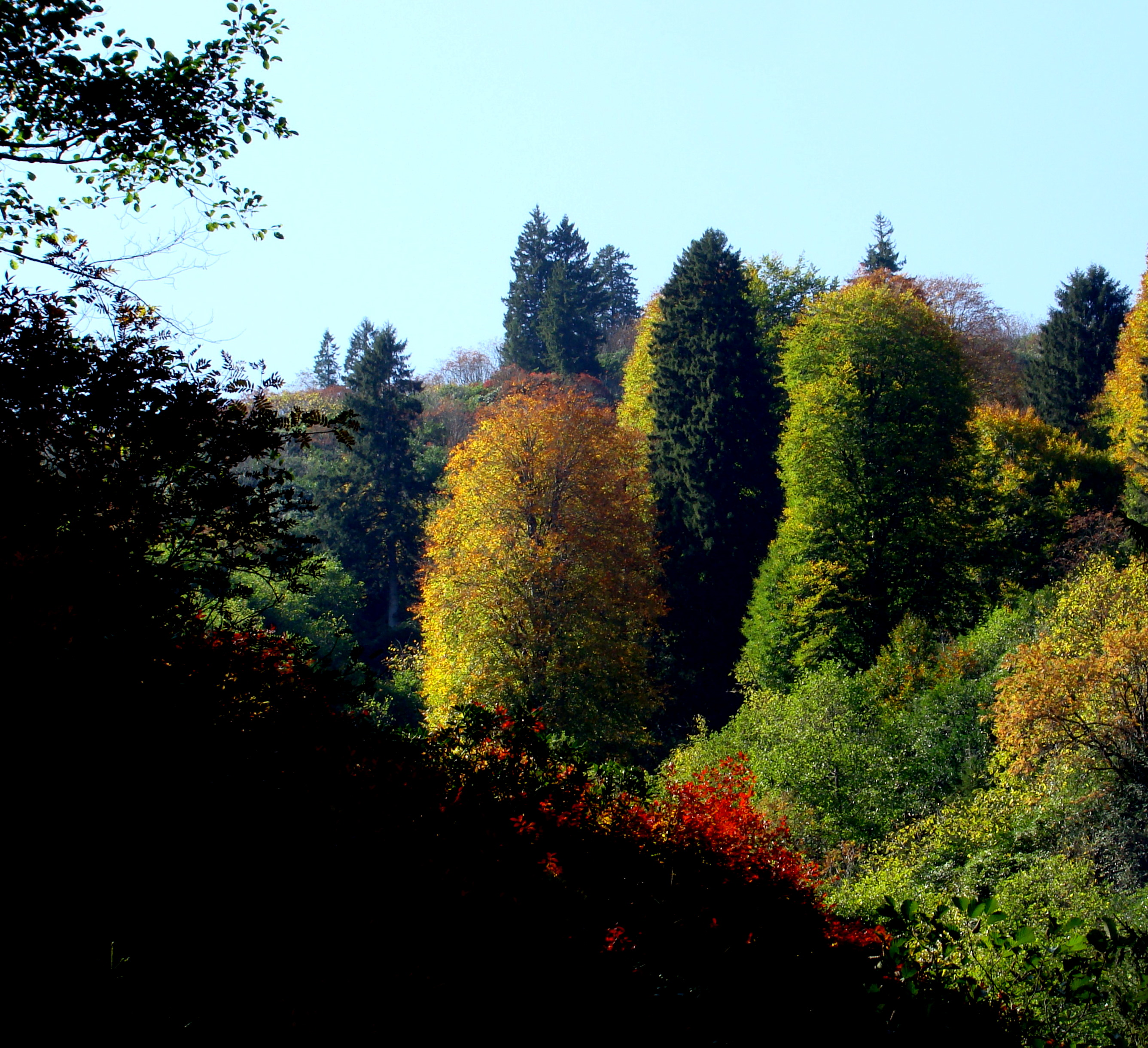 Doğu Karadeniz ormanı (Sonbahar)